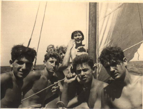 שייטי המועדון בעכו במהלך שיוט ערים 1954 על גבי הדוד נוי